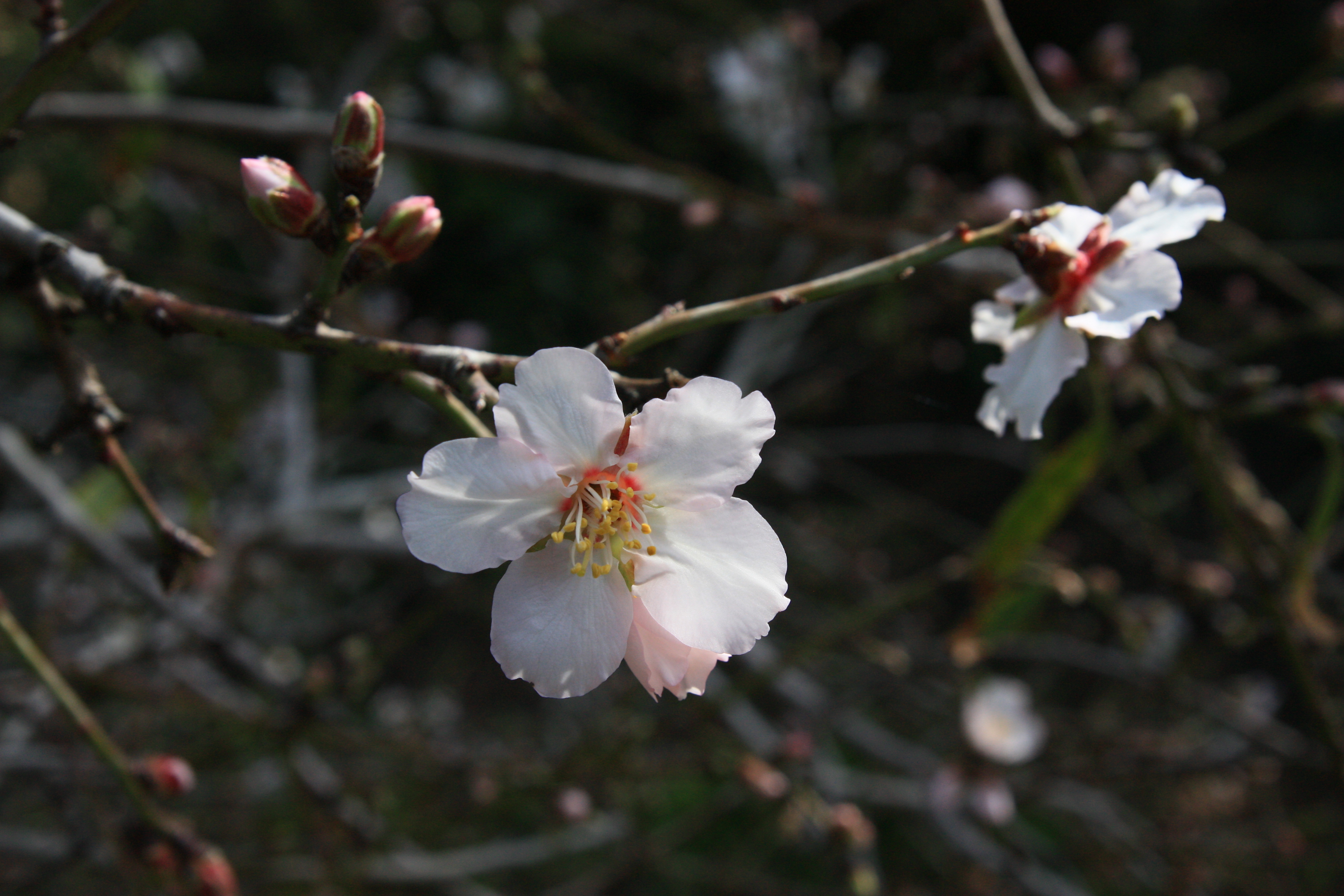 חורשת המייסדים - גבעת השבשבת, נוה שאנן חיפה enI Founders Grove - Pinwheel Hill Haifa